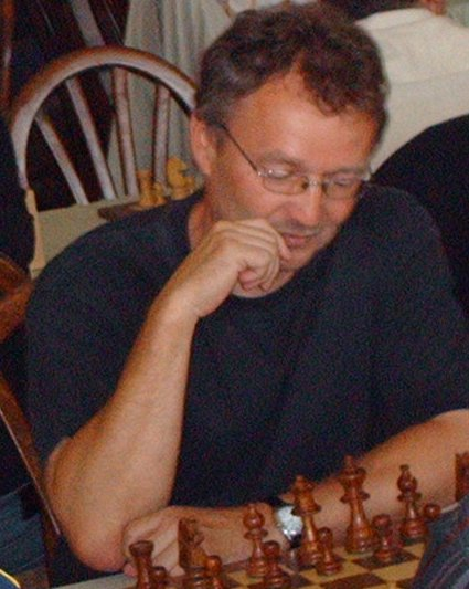 Thomas Pähtz am 23. Juni 2007 beim 43. Rosengarten-Pokalturnier in Forst (Lausitz)